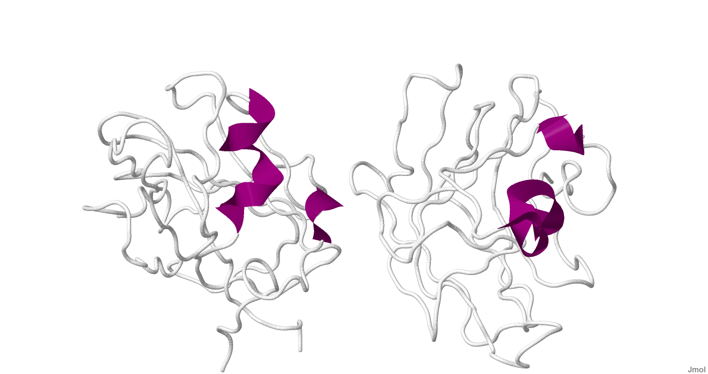 Neuropilin-1